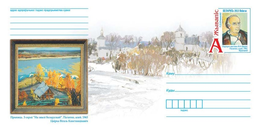 Марка. Жывапіс. Л. Д. Шчамялёў. «Партрэт мастака В. К. Цвіркі». Палатно, алей. 1982. Иллюстрация. «Прыпяць. З серыі «На зямлі беларускай». Палатно, алей. 1963. Цвірка Віталь Канстанцінавіч